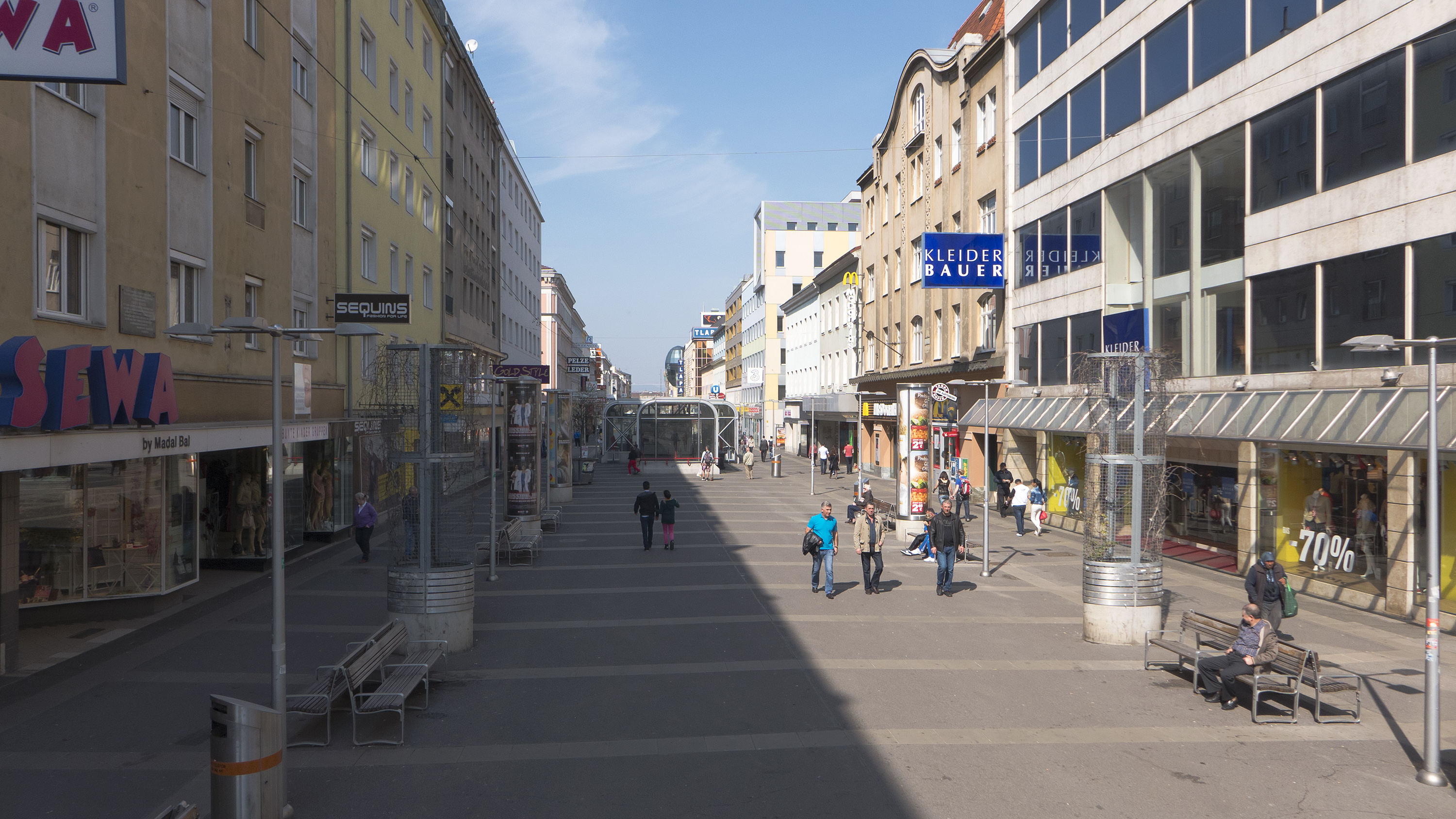 Favoritenstraße in Wien 10 bei Nr. 106 Richtung Norden